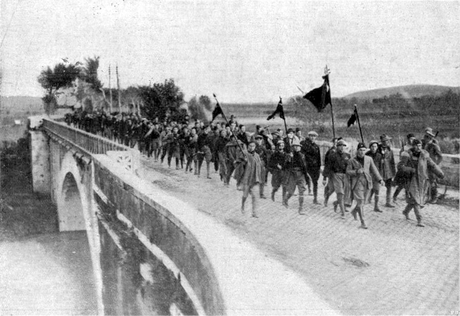 Marcia su Roma - Sul ponte Salario